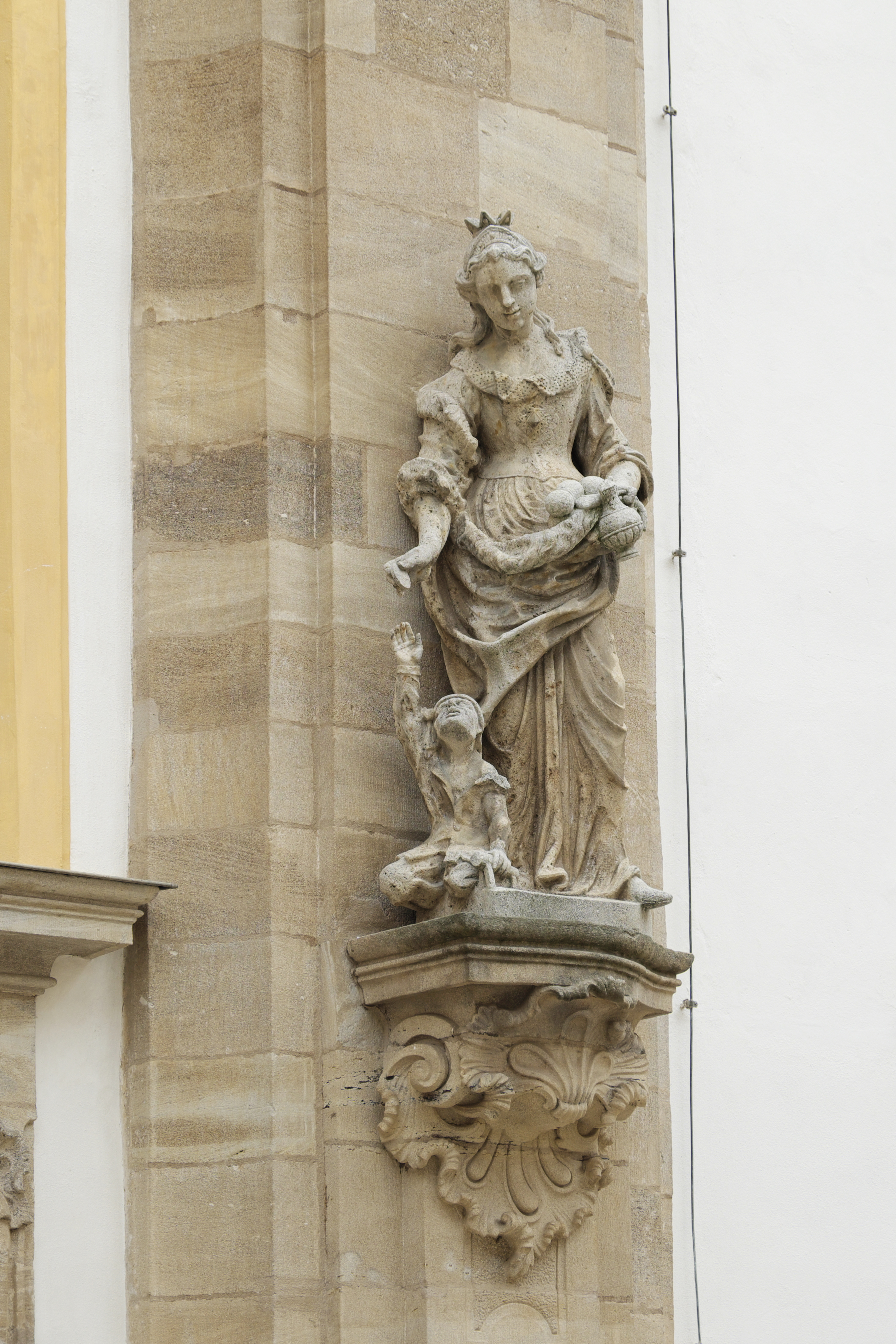 Schlosskirche des ehemaligen Deutschordensschlosses in Ellingen im Landkreis Weißenburg-Gunzenhausen (Mittelfranken/Bayern), Skulptur der Elisabeth von Thüringen am Portal, von Johann Friedrich Maucher, von 1747